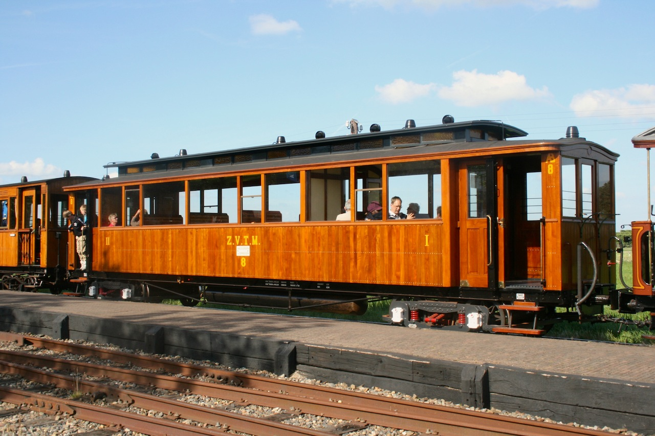 SHM rijtuig AB 8 van de Zeeuws-Vlaamse Tramweg Maatschappij, te Wognum; 17 juni 2012.